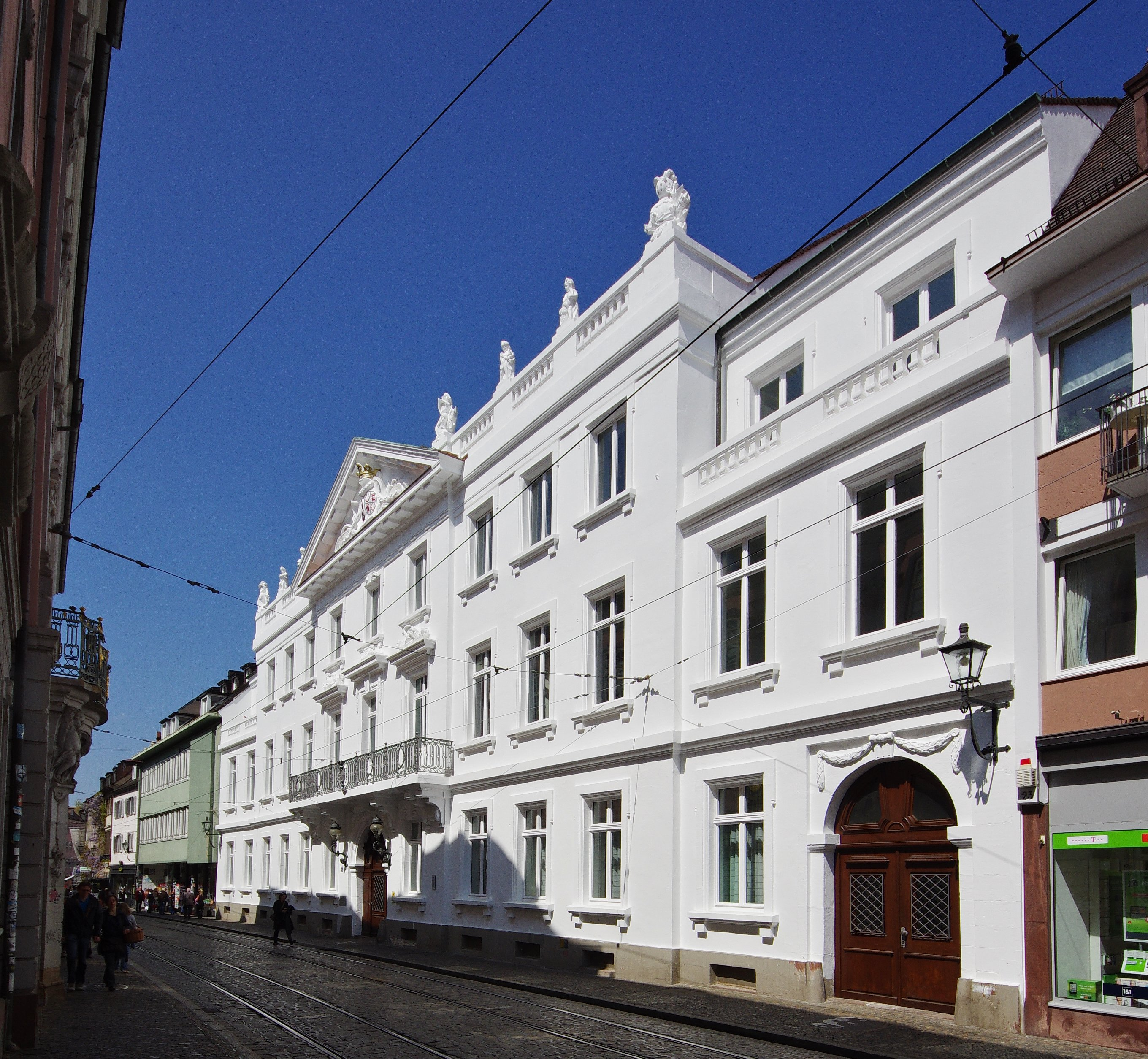 Palais Sickingen, heute Landgericht Freiburg